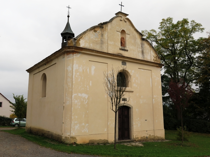 Kaple svaté Maří Magdalény, náves, Kostelík (Slabce).